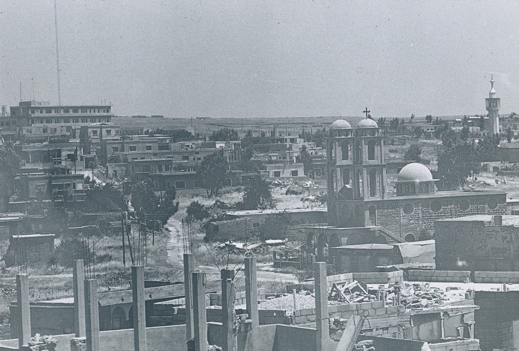 כך נראתה קונטרה כשעלינו לגולן., Original Image Name:קונטרה לאחר המלחמה, Location:קונטרה